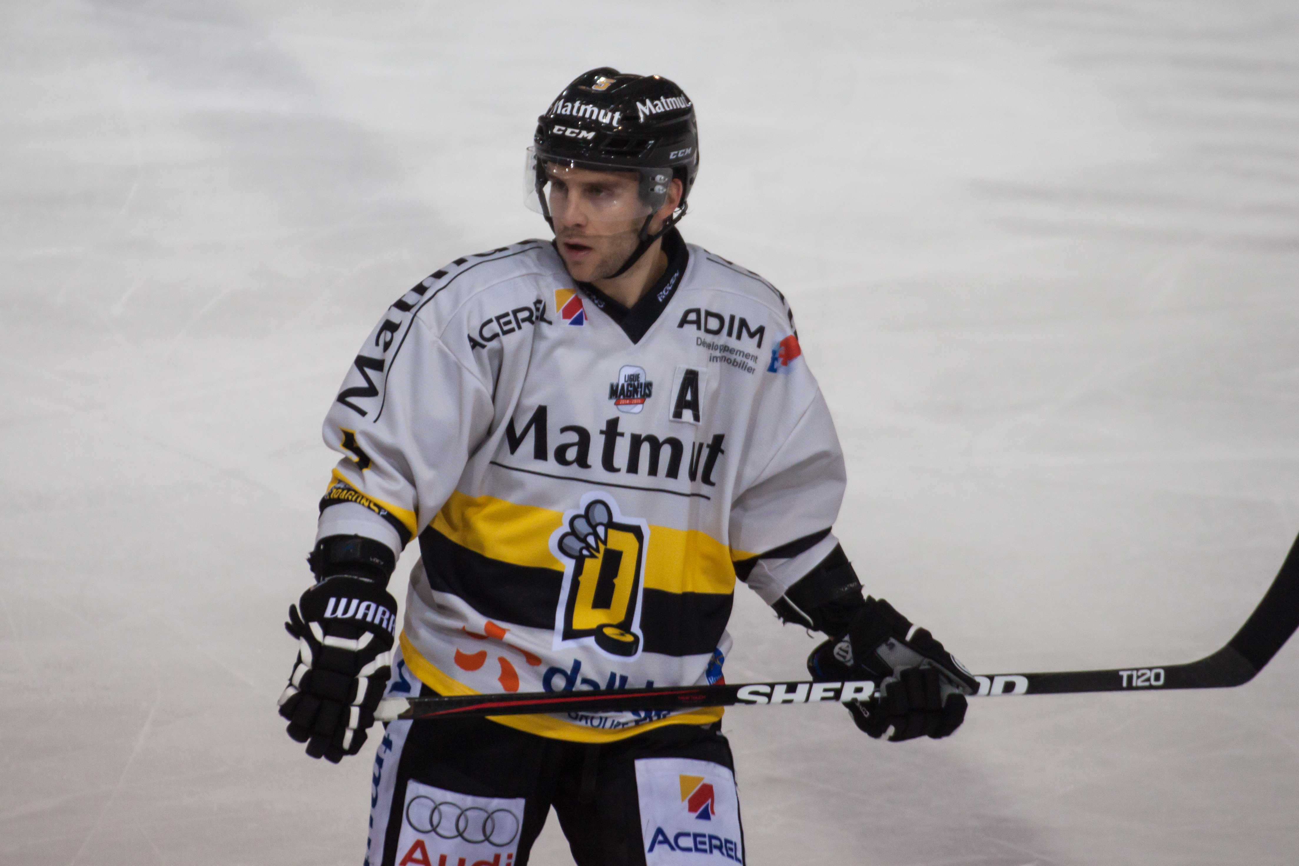 Patrick Coulomb lors du match Grenoble-Rouen le 24 octobre 2014 à la patinoire Polesud.